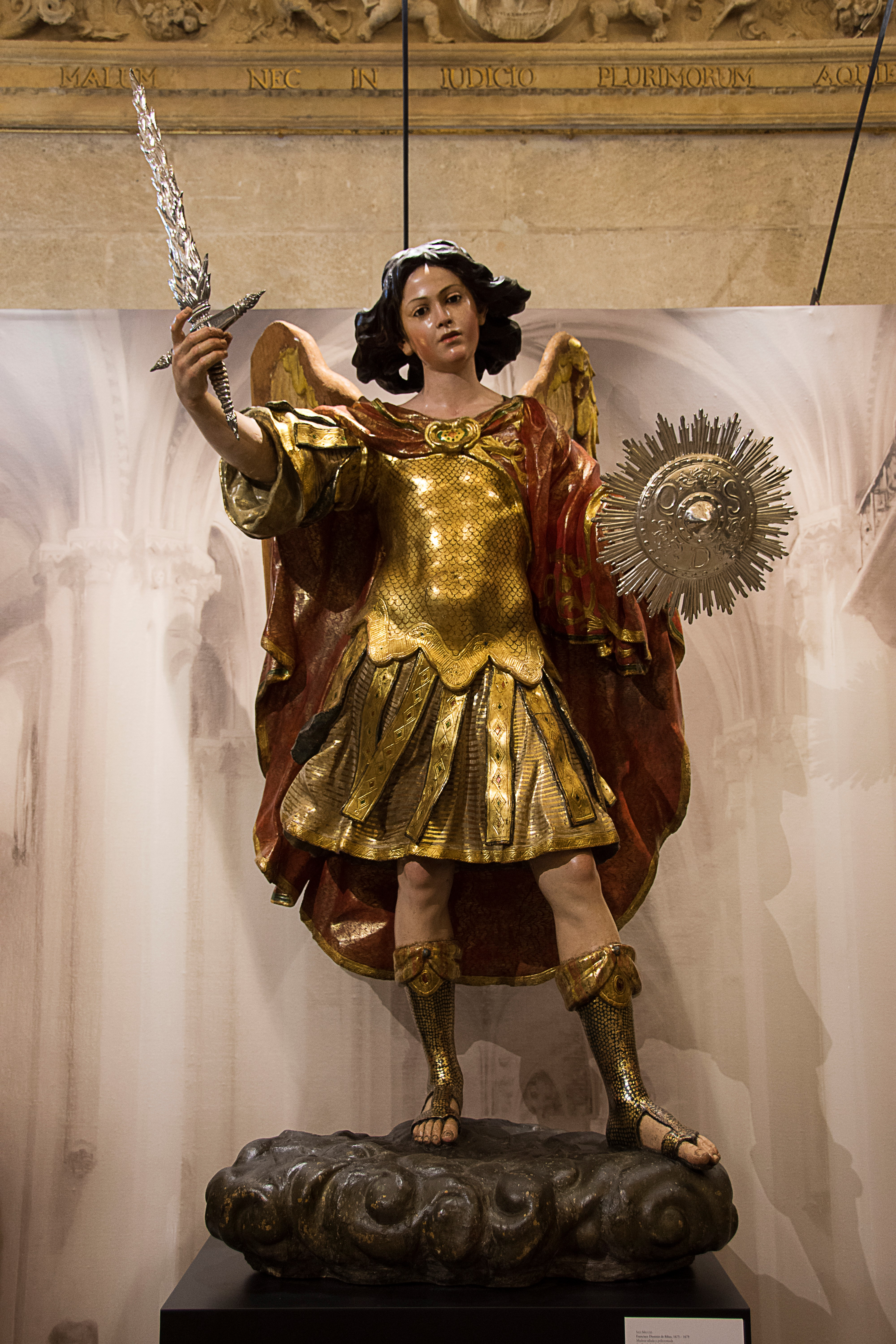 Talla de San Miguel (1675-1679), proyectada para la antigua iglesia de San Miguel de Sevilla. Autor: Francisco Dionisio de Ribas Actualmente es titular de la cofradía de el Silencio de Sevilla.